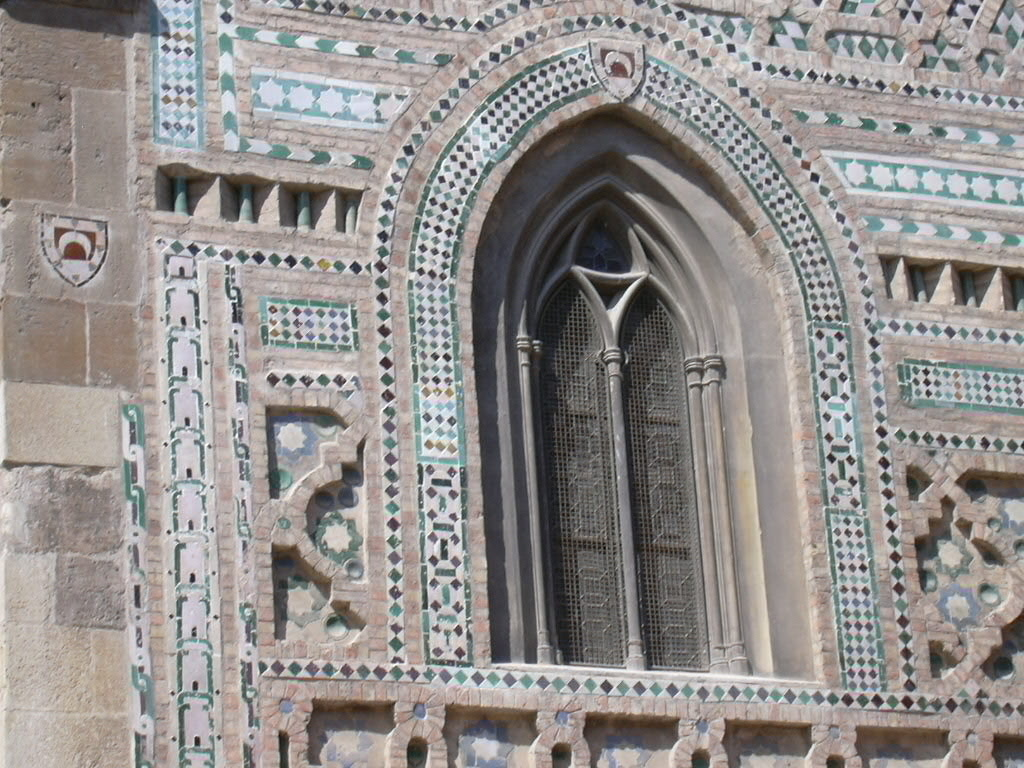 La Seo - Pared de la Parroquieta - Ventana